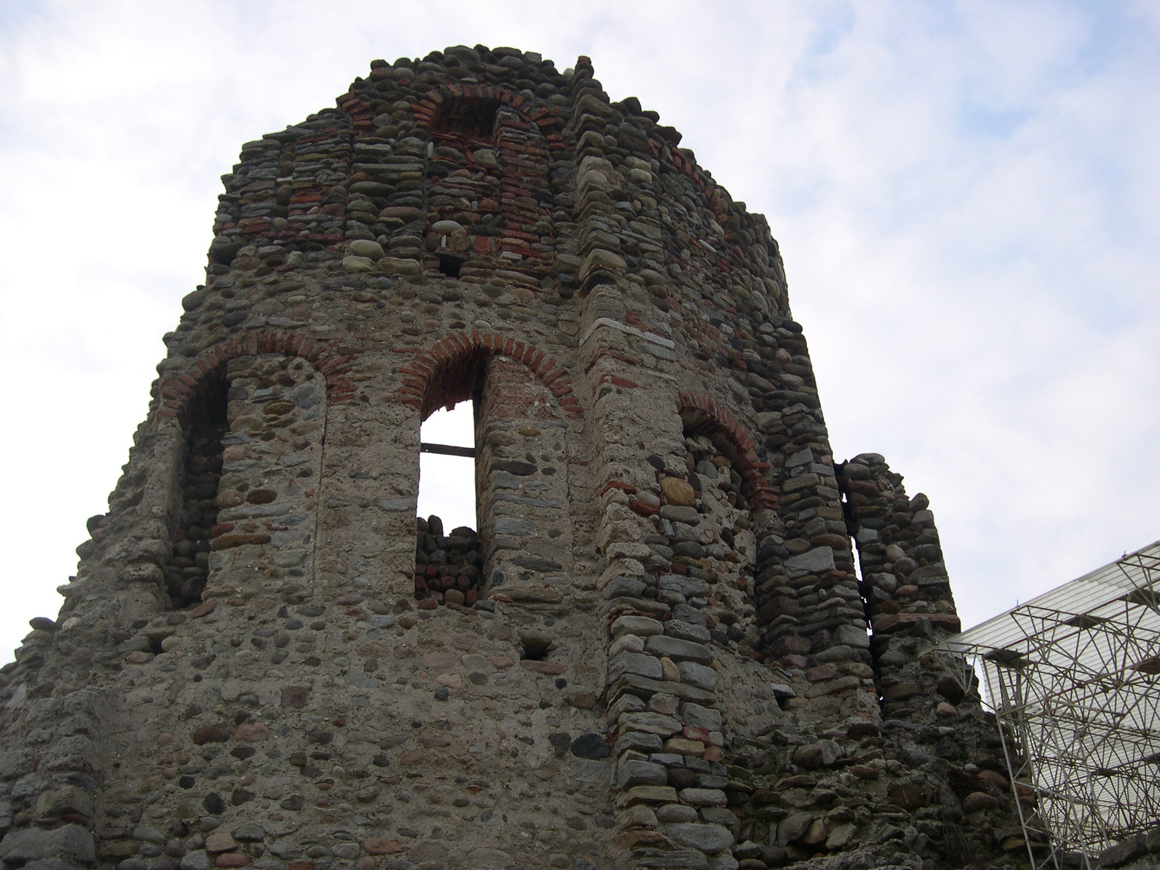 Resti della Chiesa di San Giovanni Evangelista nel Castrum di Castelseprio